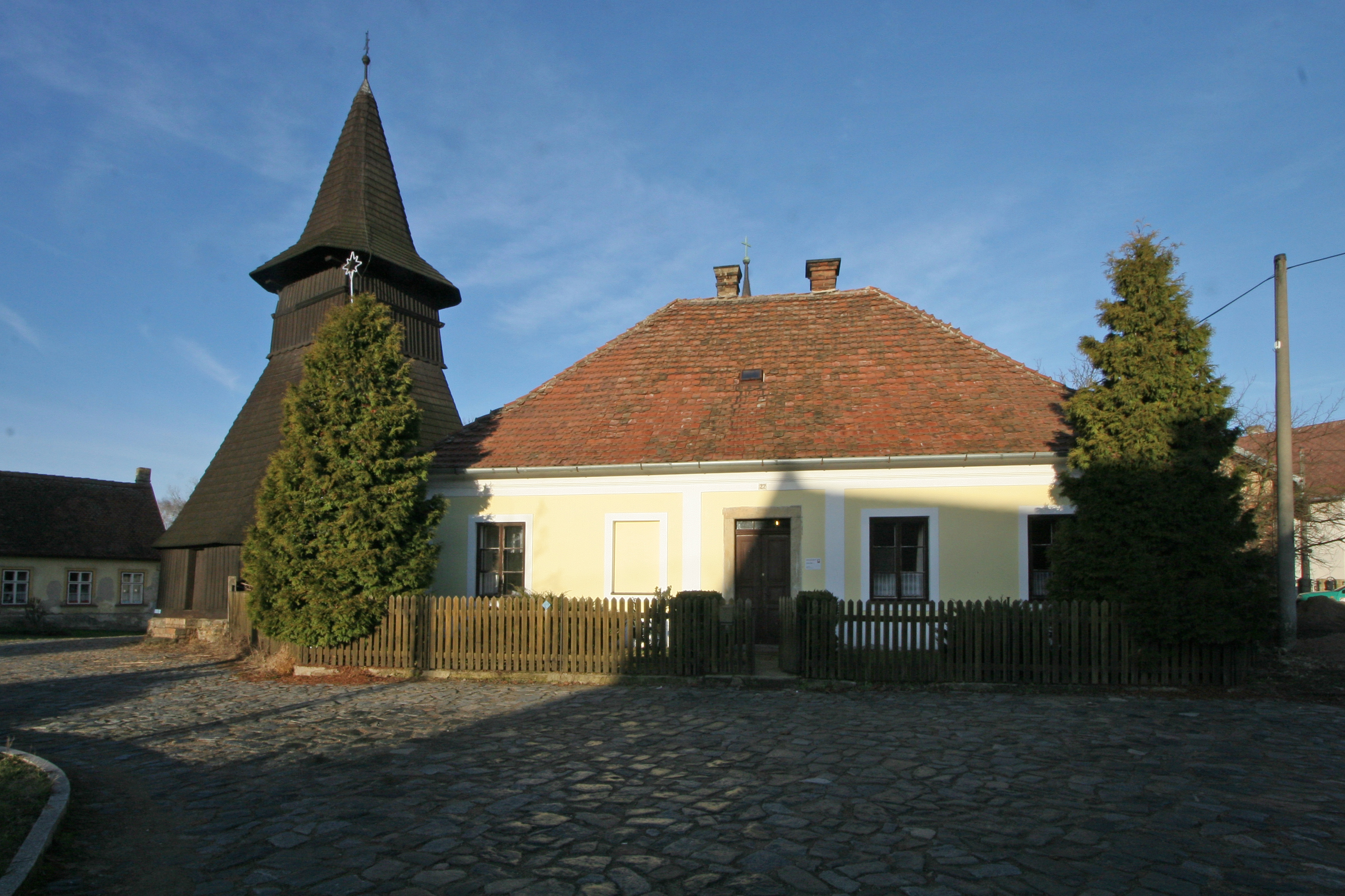 Třebosice čp. 22